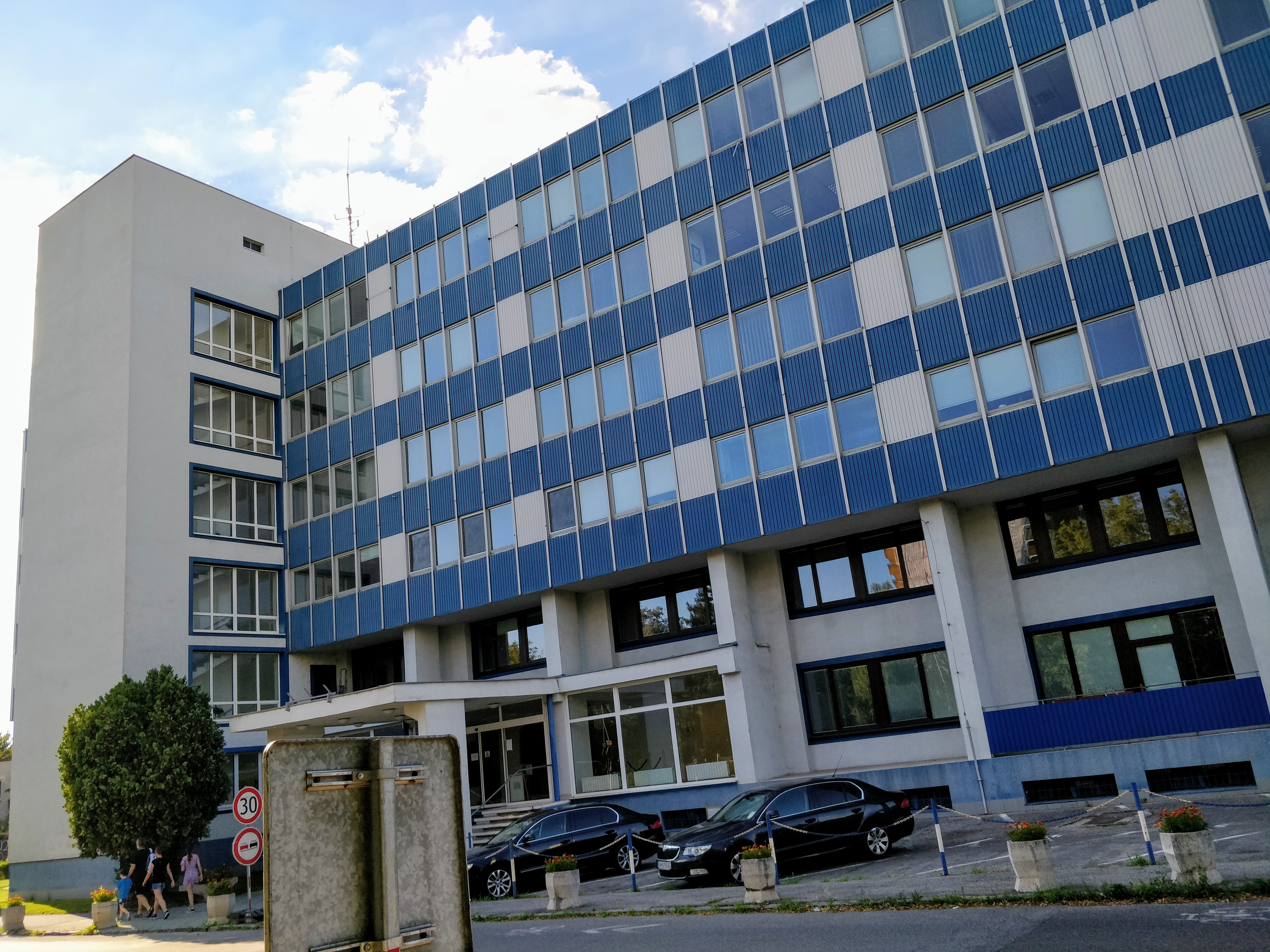 Nevädzová 5, Bratislava, Slovakia